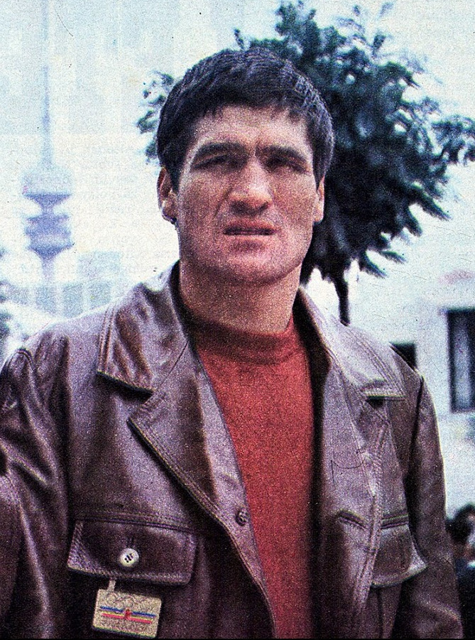 Mate Parlov